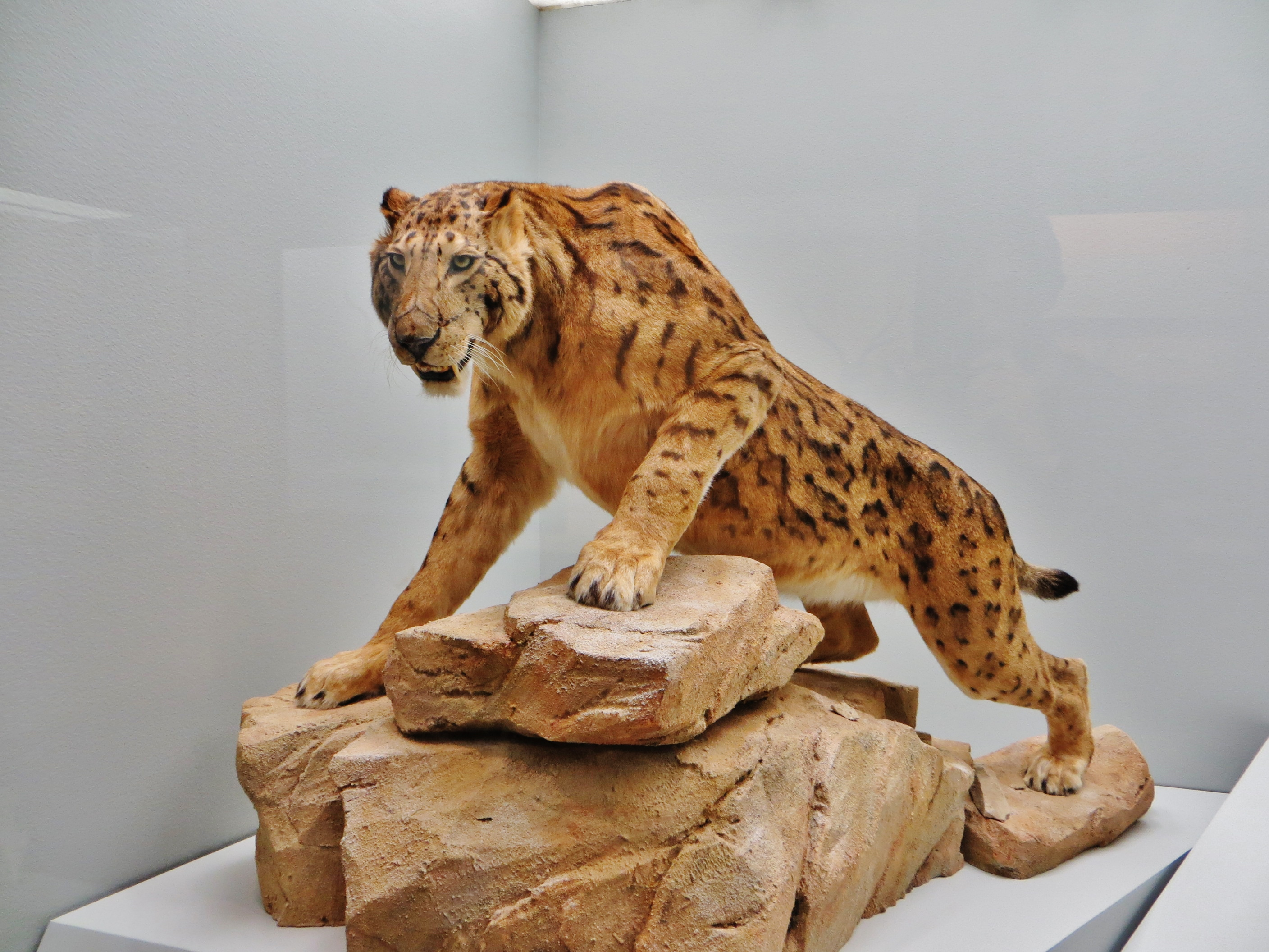 Model of Megantereon - Took the picture at Natural History Museum, Basel